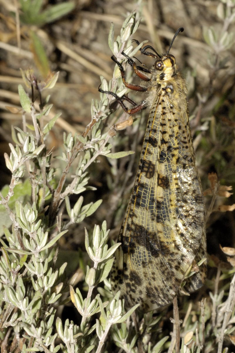 Palpares libelluloides. Photo prise à TOUËT-de-l'ESCARÈNE. Alpes-Maritimes. France